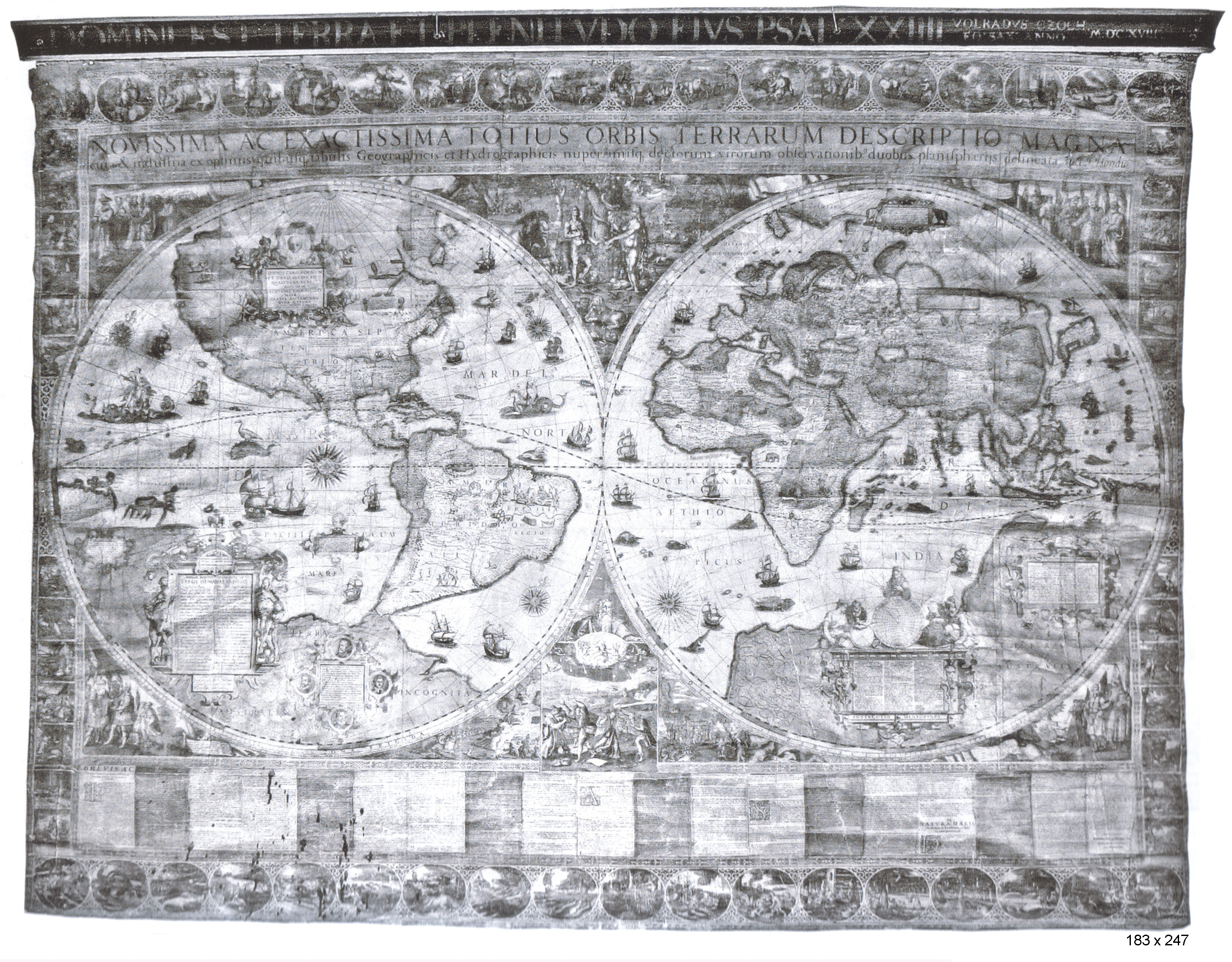 Wandkaart van de wereld in 20 bladen